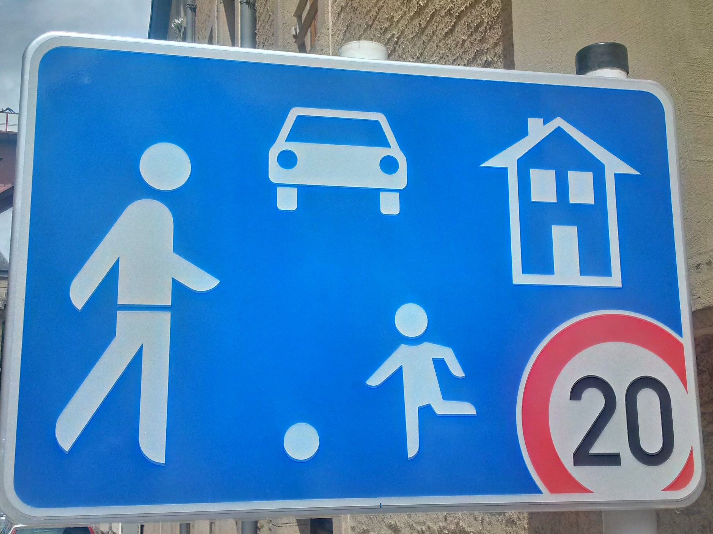 Signal routier E,25a du Code de la route luxembourgeois (version 25 juillet 2015)